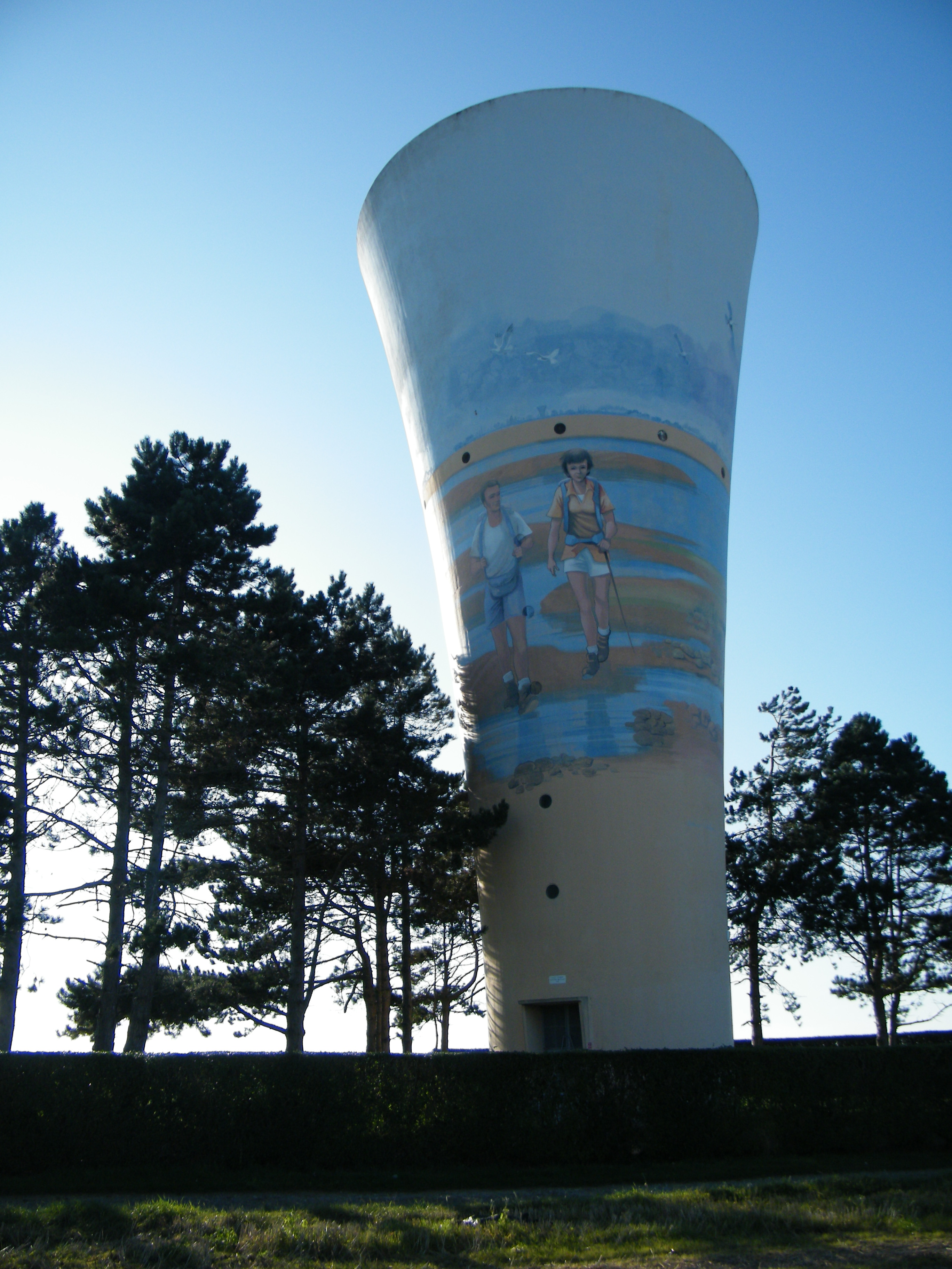 Brutelles, Somme, Fr, château d'eau